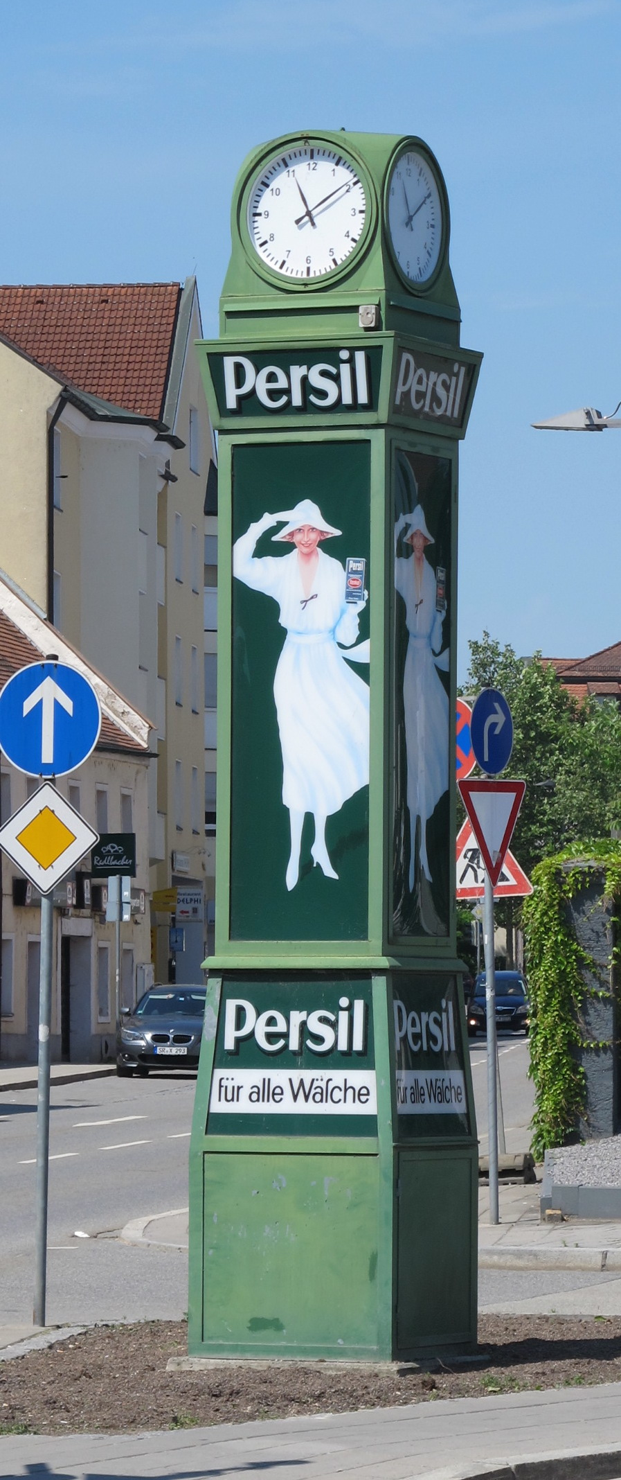 Persiluhr in Straubing, an der Kreuzung Innere Passauer Straße / Mühlsteingasse und Heerstraße; Replikat einer von innen beleuchteten Werbe-Säule mit Normaluhr, die als Werbung eine der bekanntesten Werbegrafiken der 1920er Jahre zeigt: die für das Waschmittel Persil werbende „Weiße Dame“